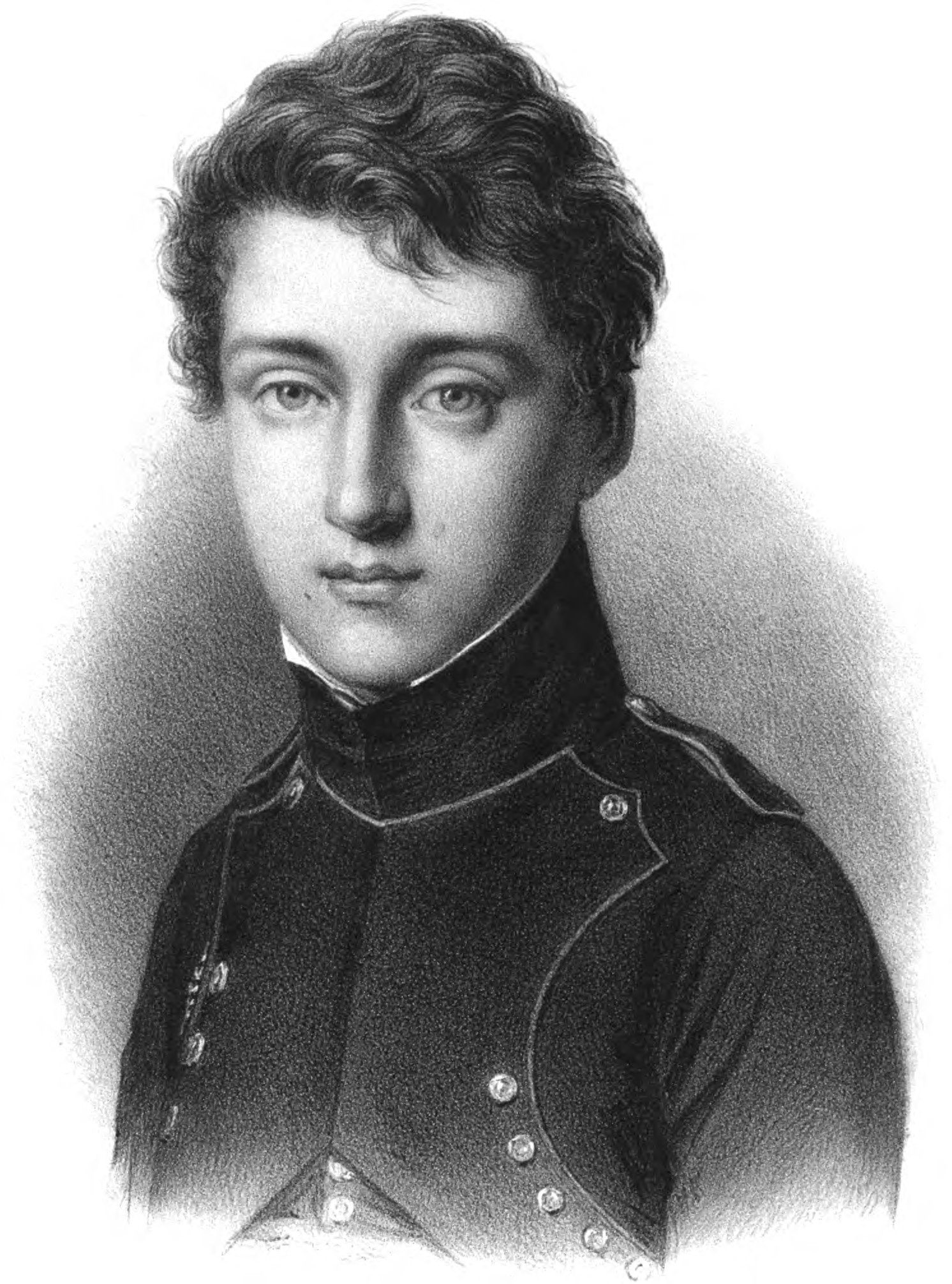 Sadi Carnot en 1813 âgé de 17 ans en uniforme de l'Ecole Polytechnique, gravure d'après le tableau de Léopold Boilly, parue en 1878 dans la réédition de "Réflexions sur la puissance motrice du feu", Gauthier-Villars, Paris.